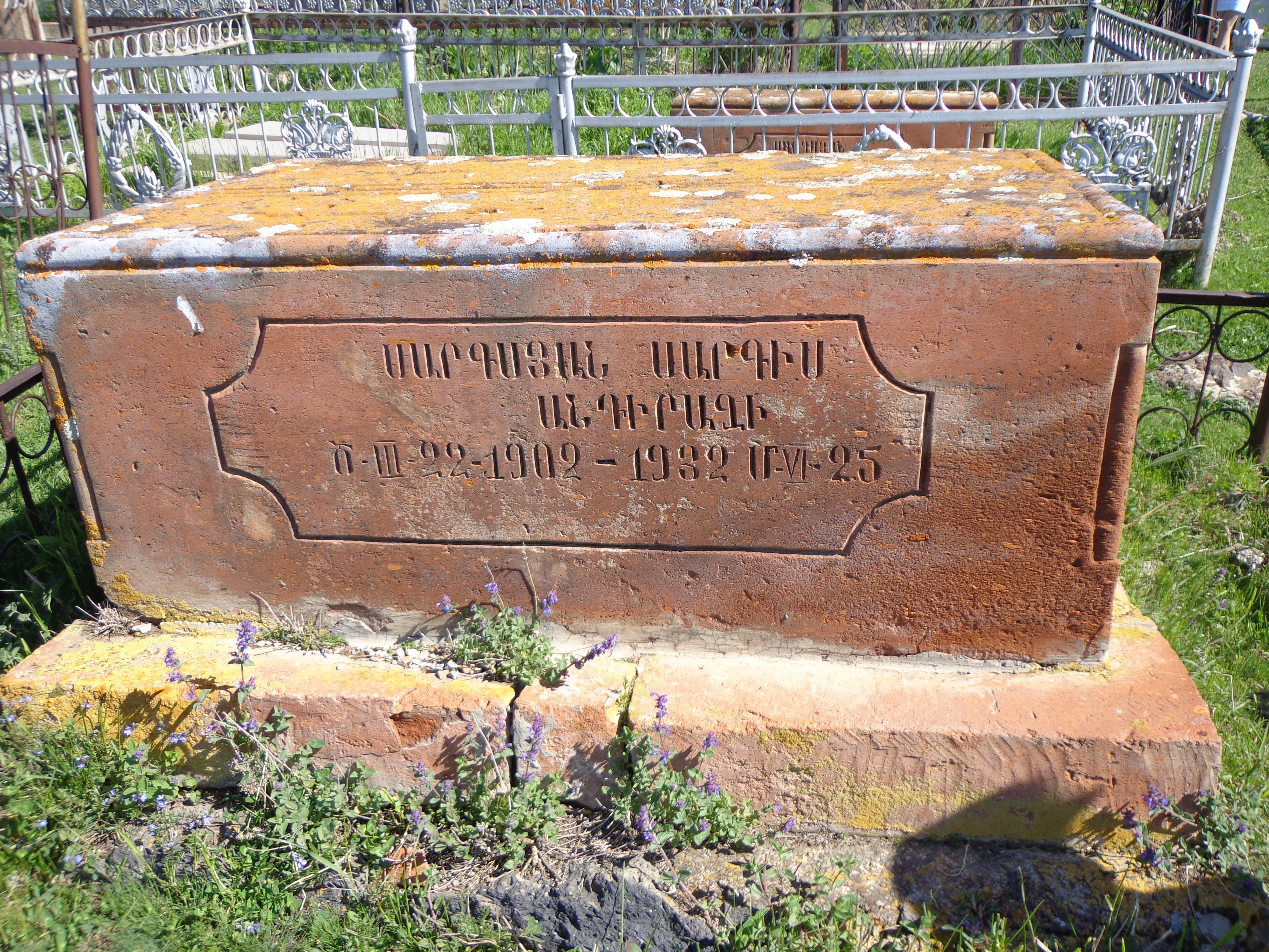 Գերեզմանաքար Սաքոնց գերեզմանոցում